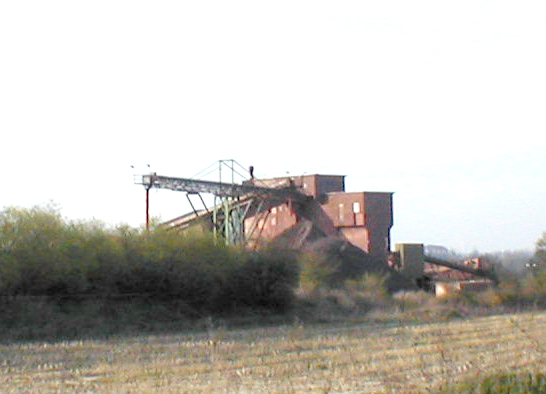 Das Brechergebäude und der Verladebunker mit Bandberg der Grube Wohlverwahrt-Nammen bei Porta Wesfalica. Wohlverwahrt-Nammen ist das letzte heute noch fördernde Bergwerk im Mindener Revier. Betreiber ist die Barbara-Erzbergbau GmbH. Einst wurde in diesem verhältnismäßig kleinen Erzrevier in der Eisenerzgrube Porta eine deutlich größere Förderleistung erzielt.